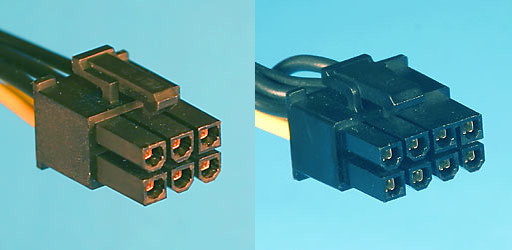 Wtyki 6- i 8-stykowe przeznaczone do zasilania kart graficznych.